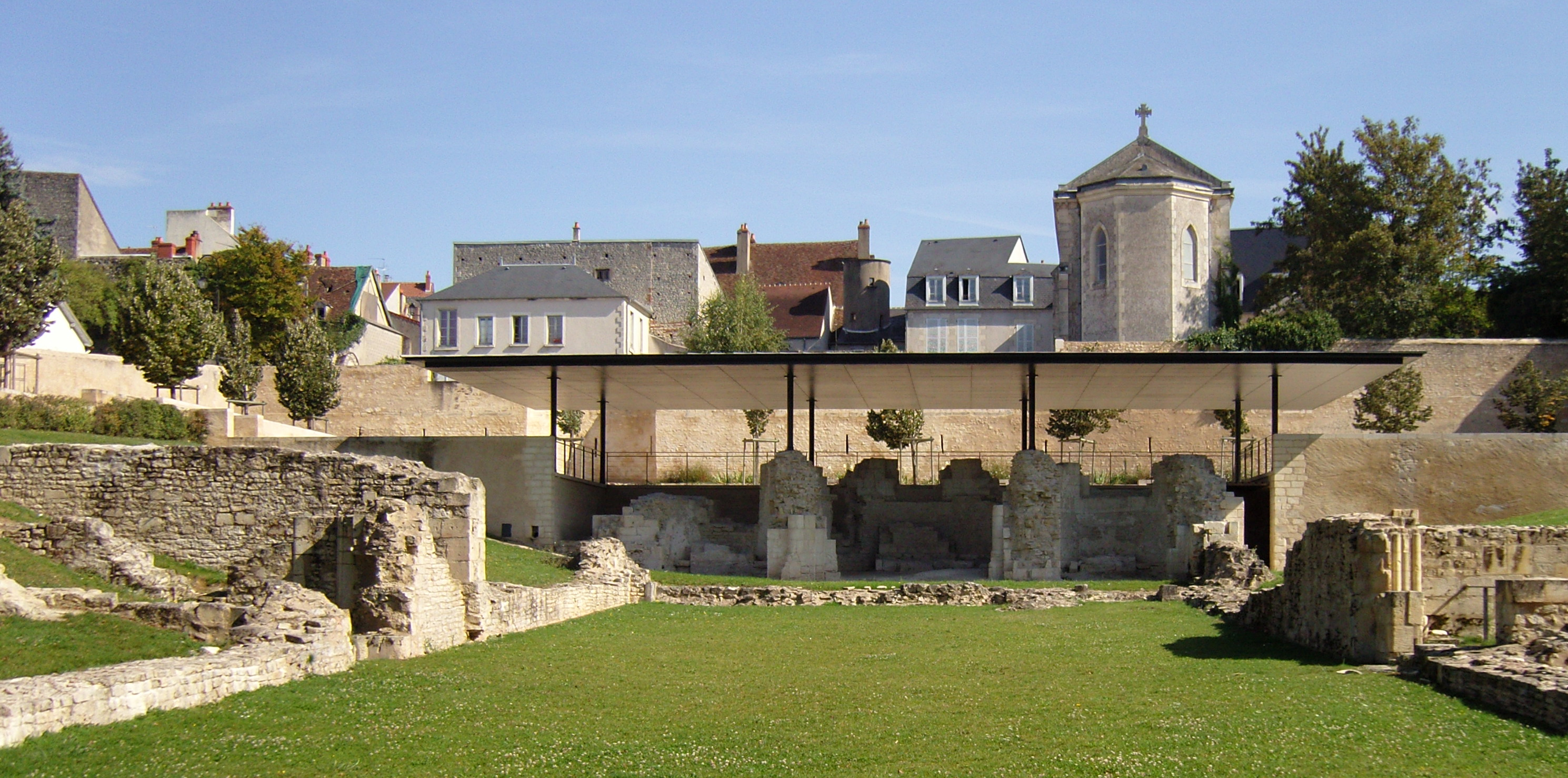 Ruine von St. Laurent in La Charité-sur-Loire.